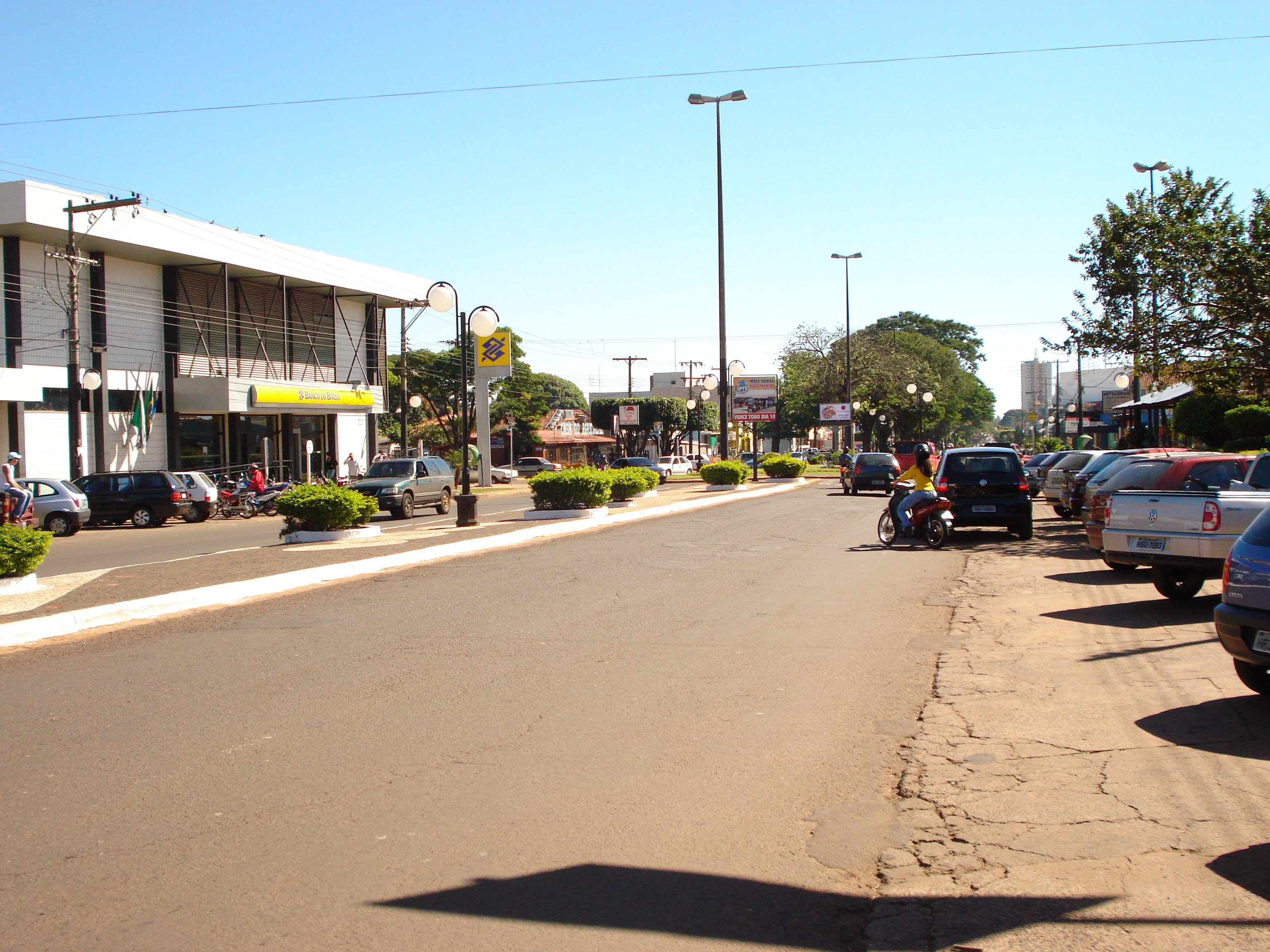 Centro de Ponta Porã